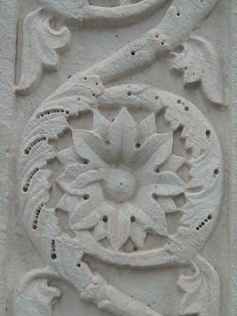 Sculture del portale